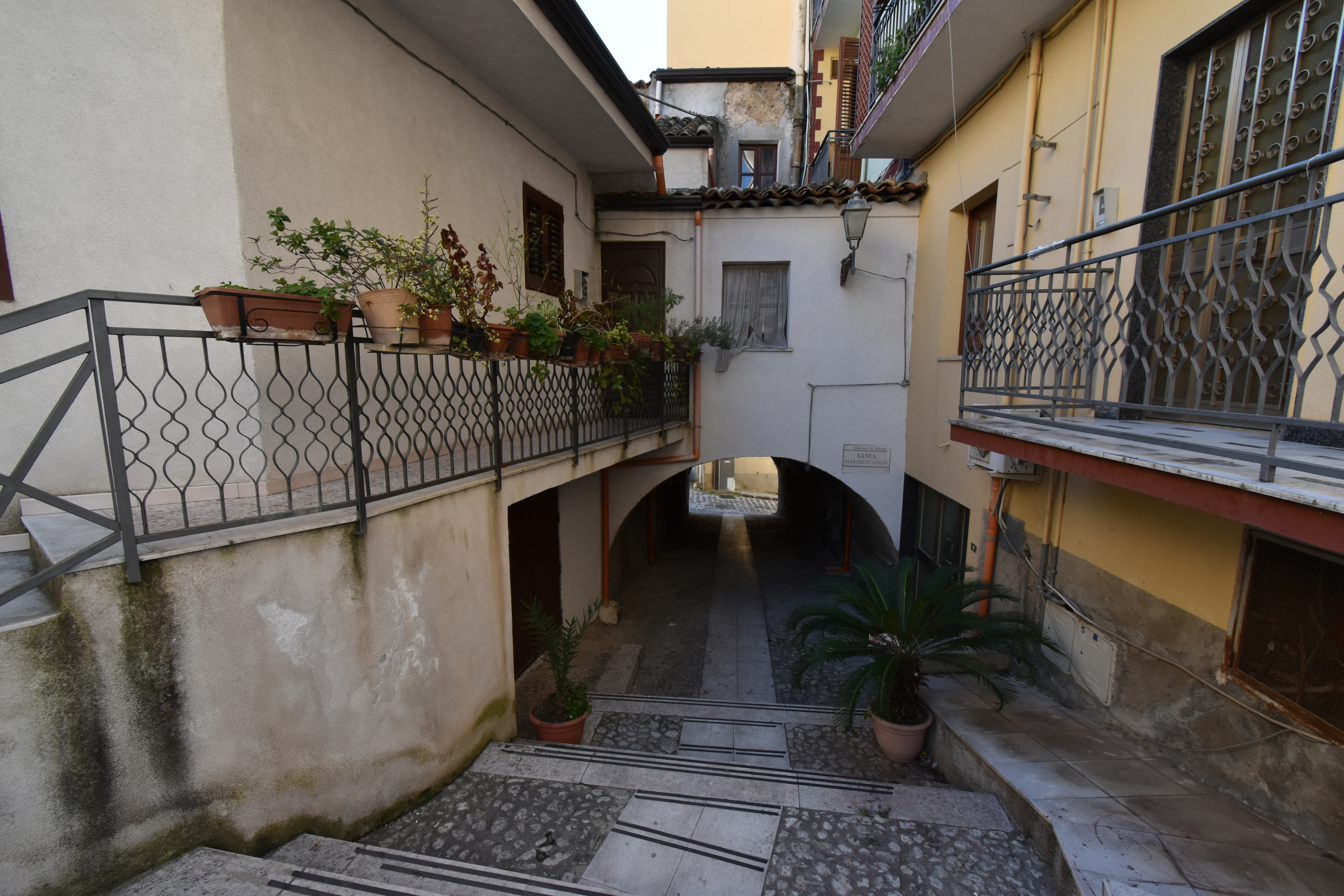 Bivona - Xanea Marchese Greco